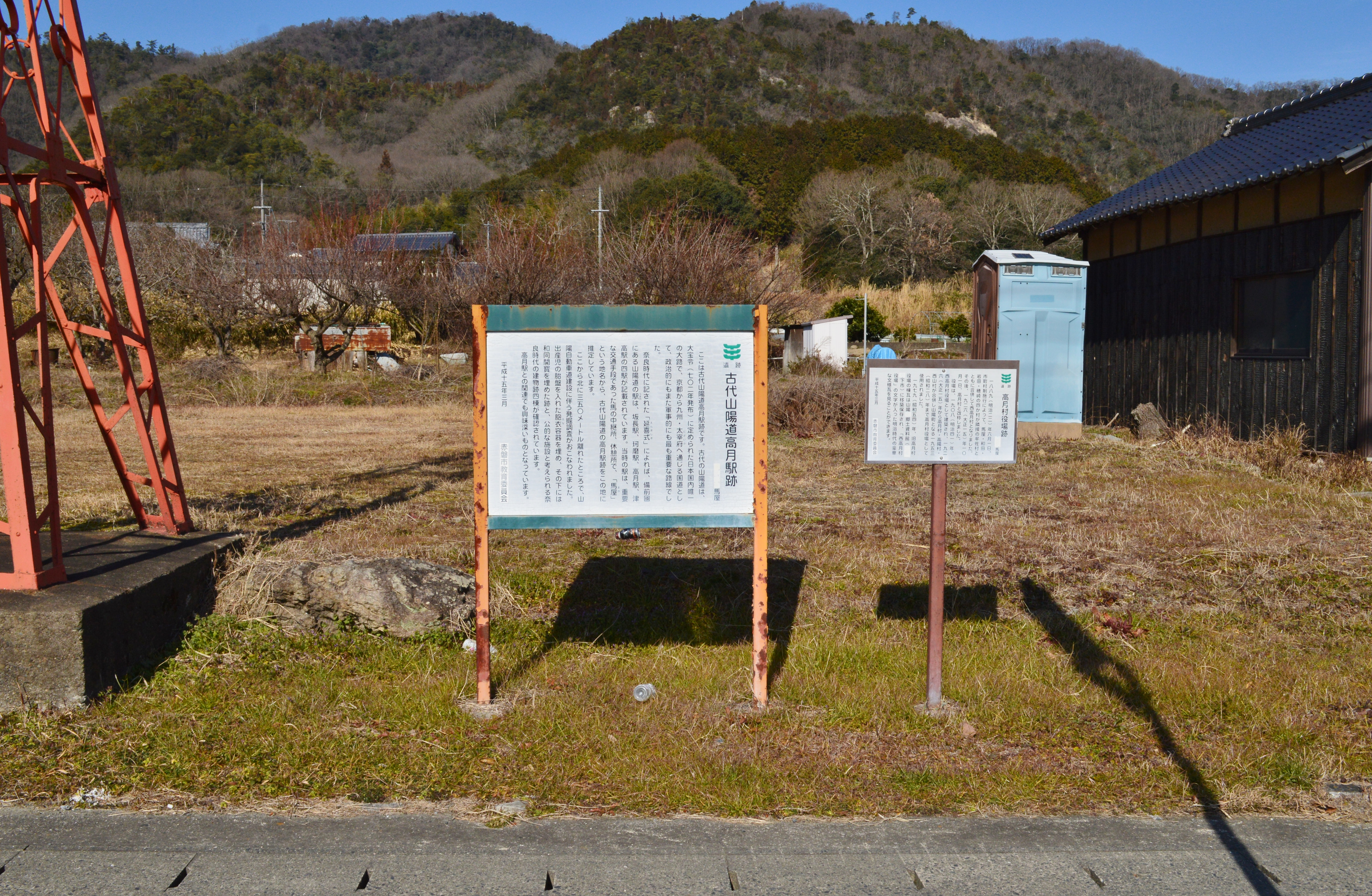 山陽道高槻駅家跡碑